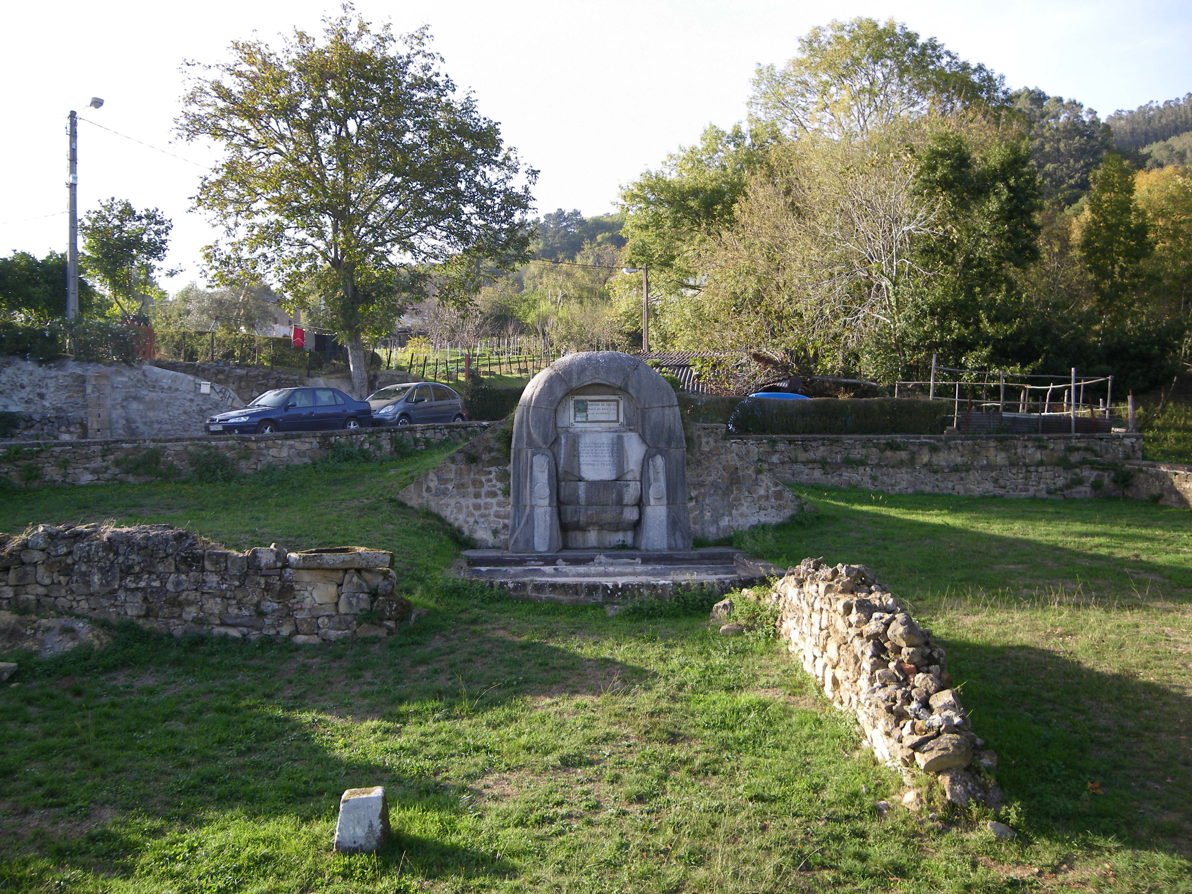 Antonio Trueba Kintana idazlearen jaiotetxearen aurriak eta bere omenezko oroitarria, Galdameseko Montellano auzoan.